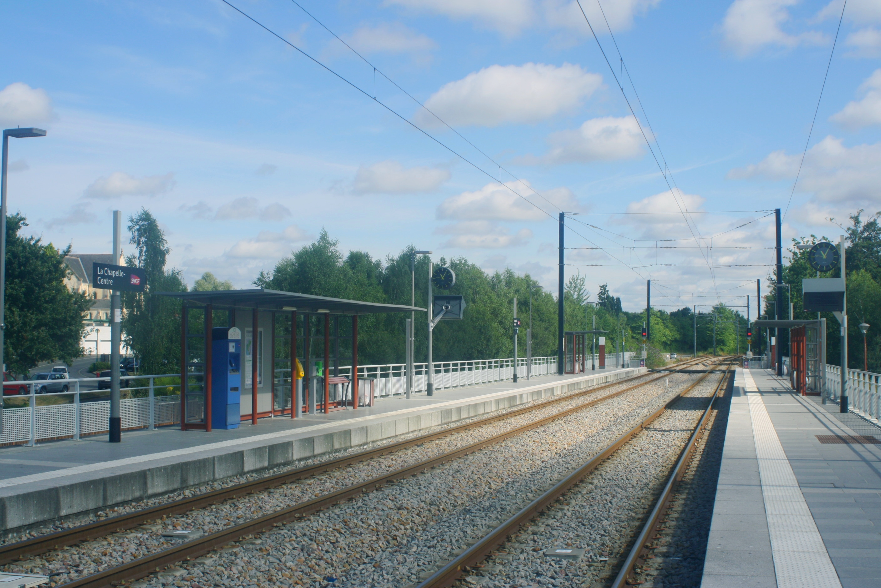 vue en direction du Nord (vers châteaubriant)